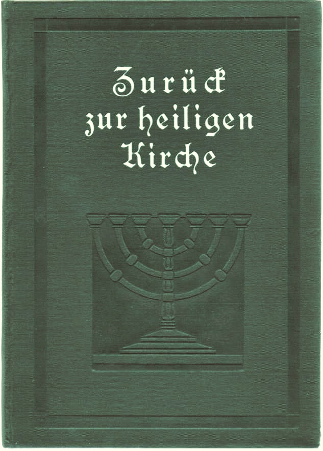 Albert von Ruville (1855-1934), Professor der Geschichte an der Universität Halle, Konvertit zur katholischen Kirche, Buchcover, 1910